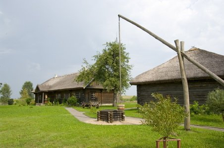 Завоссе. Від на пабудовы сядзібы А.Міцкевіча. Фота ўзята з сайта Дзяржаўнага музея гісторыі беларускай літаратуры.